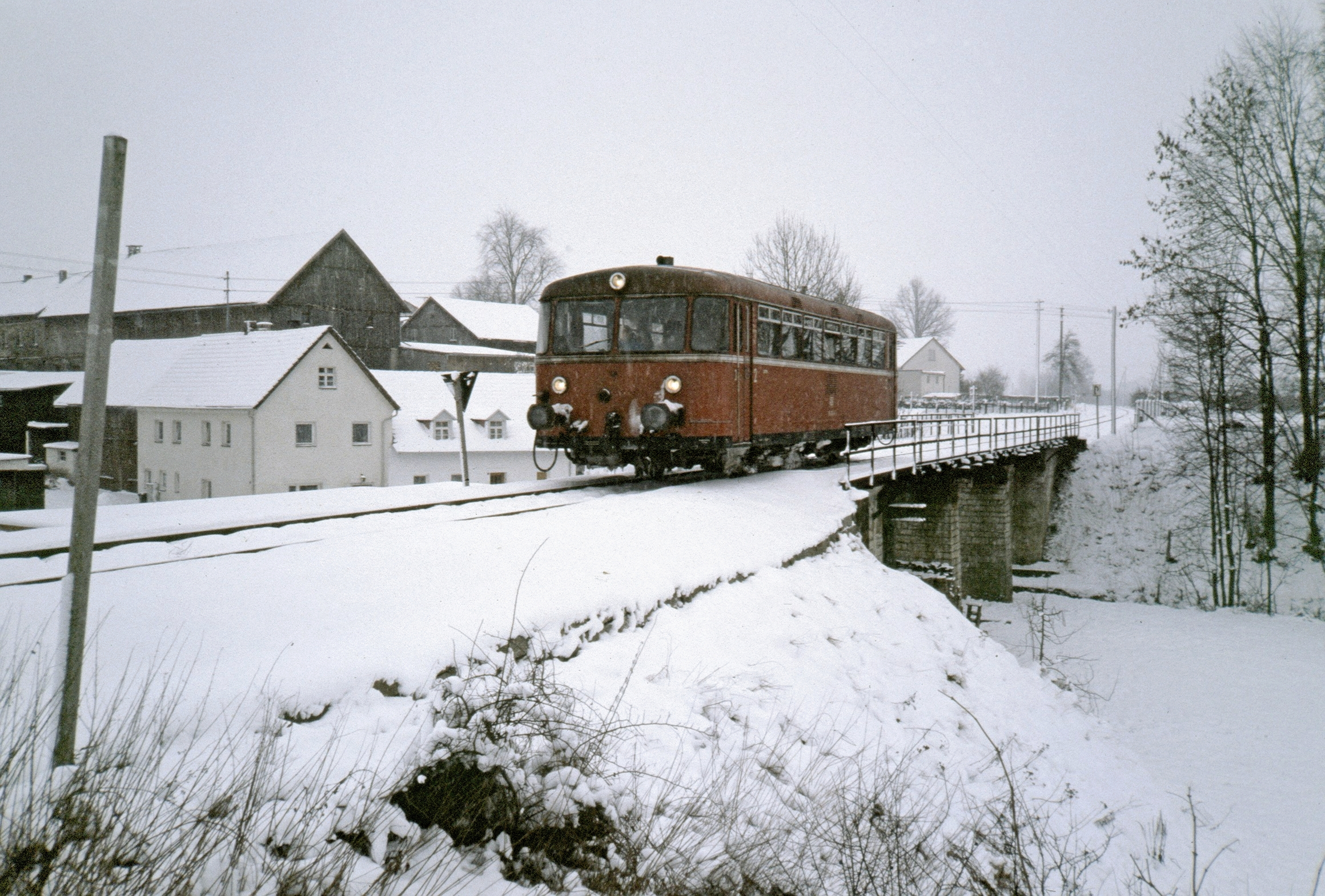 Verbrennungstriebwagen der Baureihe 798 im Görschnitz.